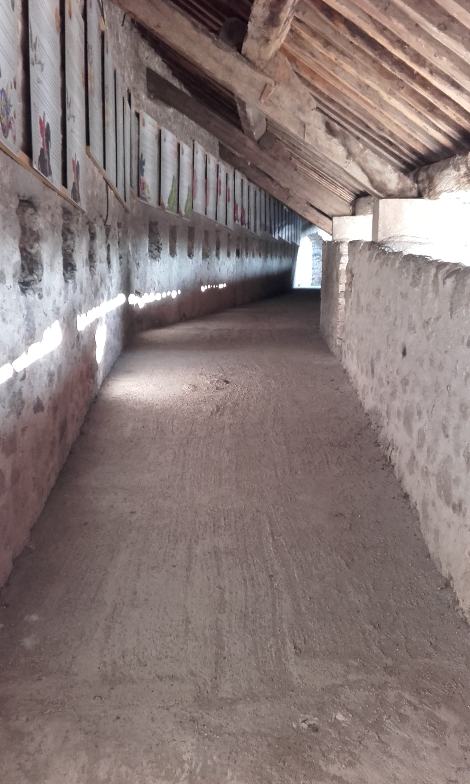 Niveau supérieur des Remparts XVIIème couvert par une charpente.